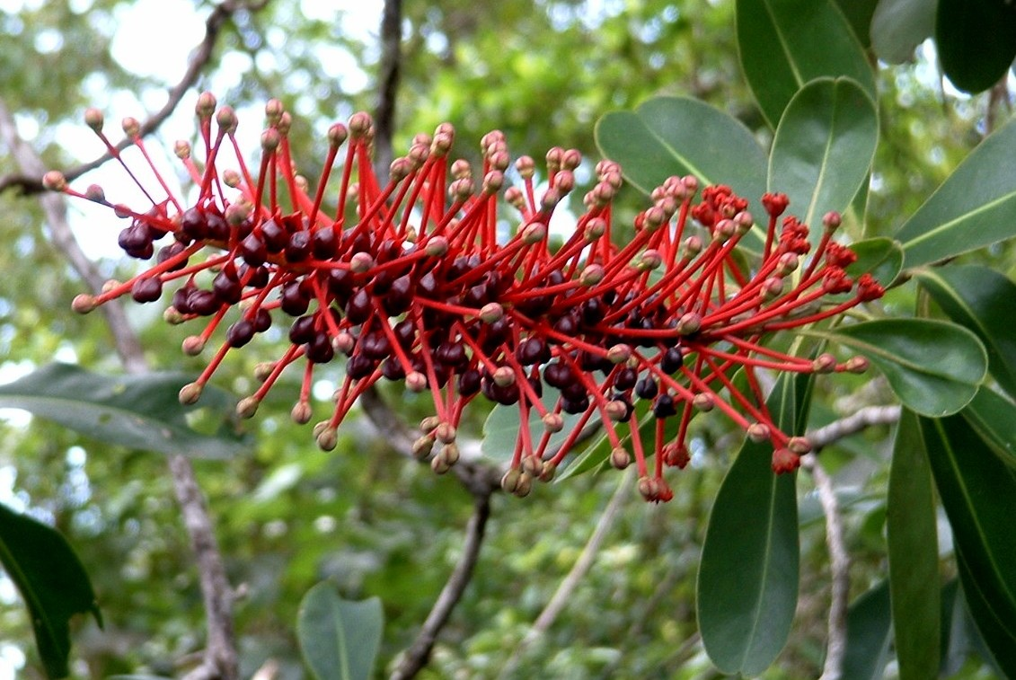 Serra Do Mar State Park--Genus-Marcgravia , Family-Marcgraviaceae